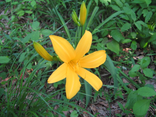 Hemerocallis middendorfii var. esculenta f. musashiensis(Mt. Sengen, 東京都府中市)[1]